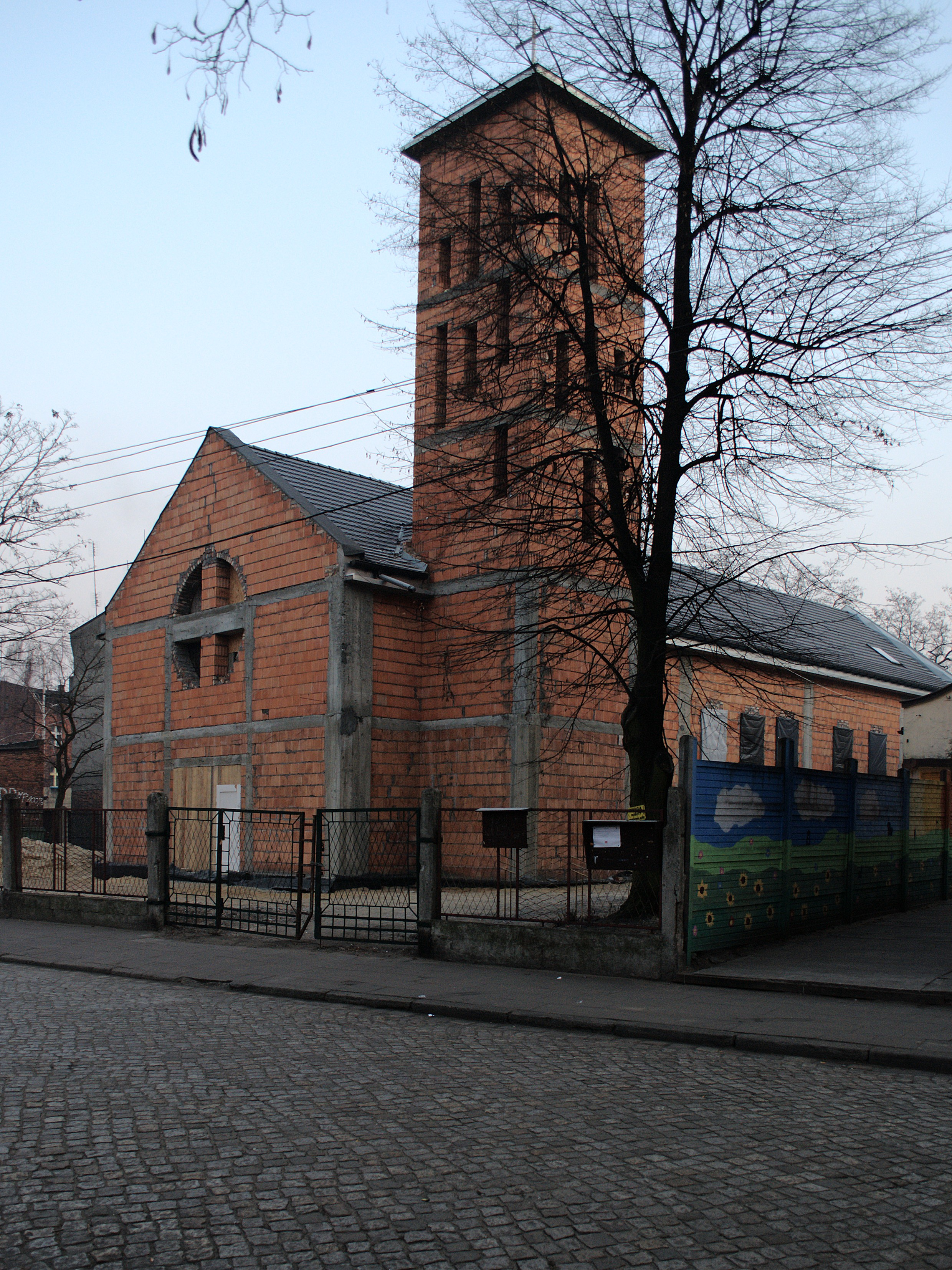 Zabrze. Kościół Świętego Ducha (III).